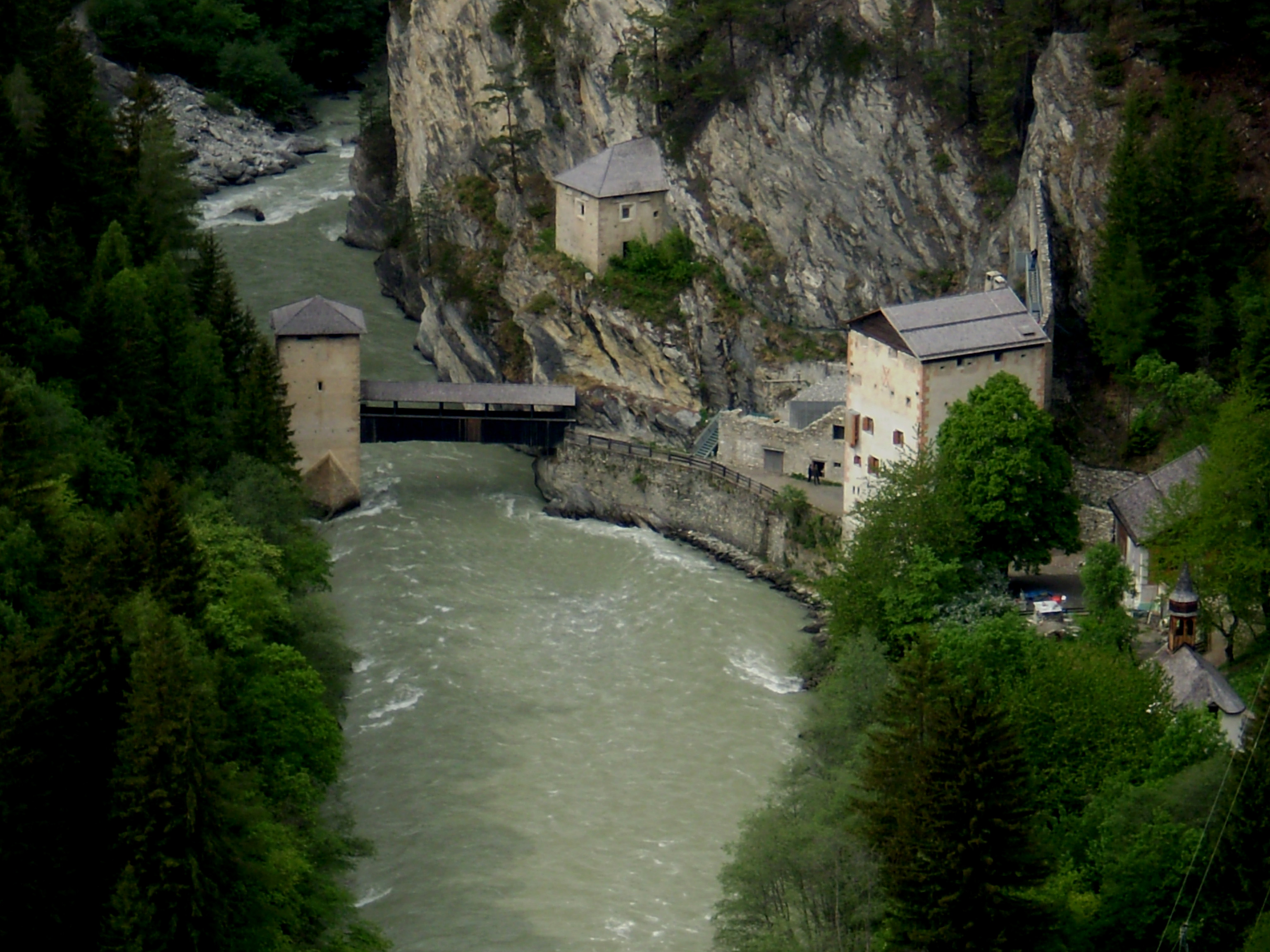 Befestigungsanlage Altfinstermünz Gesamtanlage